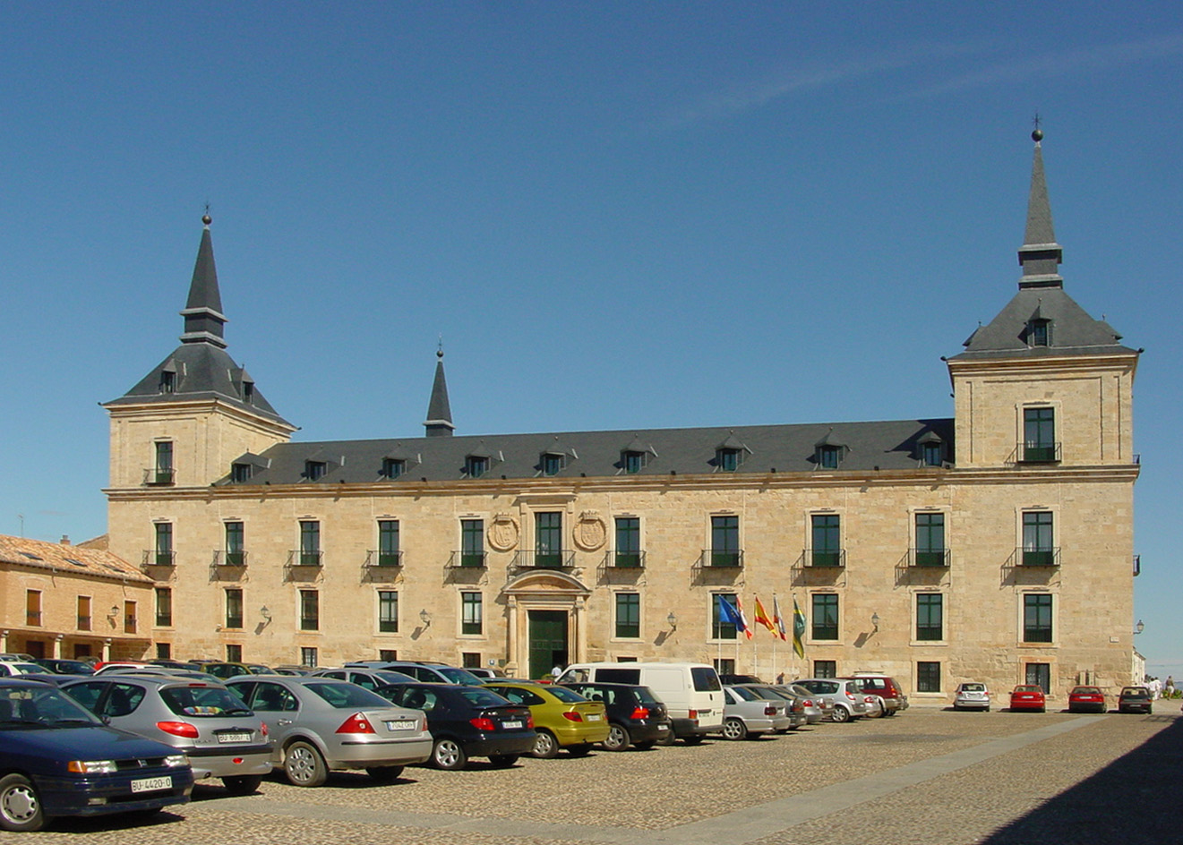 Palacio del duque de Lerma en la ciudad de Lerma (Burgos, España).